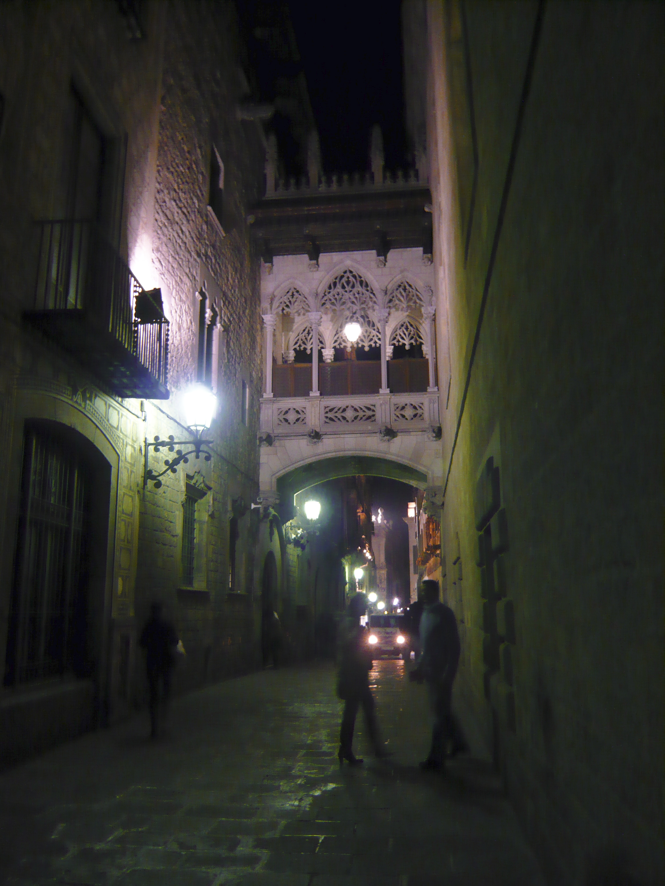 Pont del carrer del Bisbe